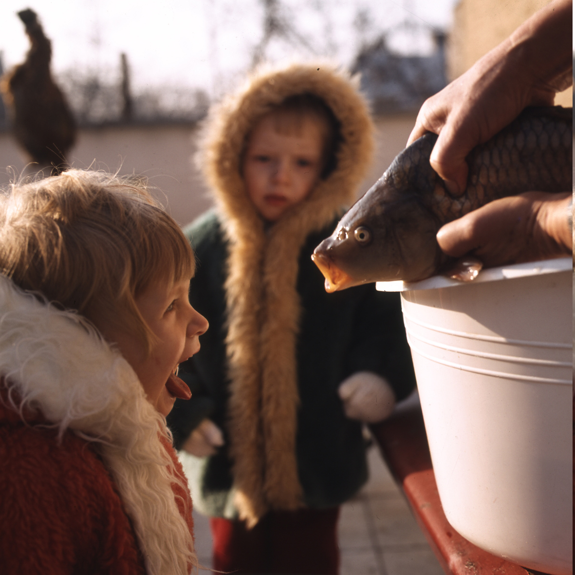 Jovan Dezort, fotografie z archivu.